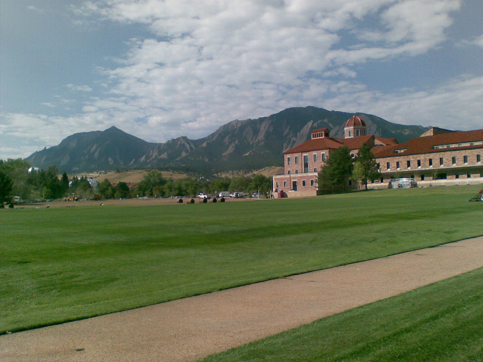 Koelbel field, CU Boulder